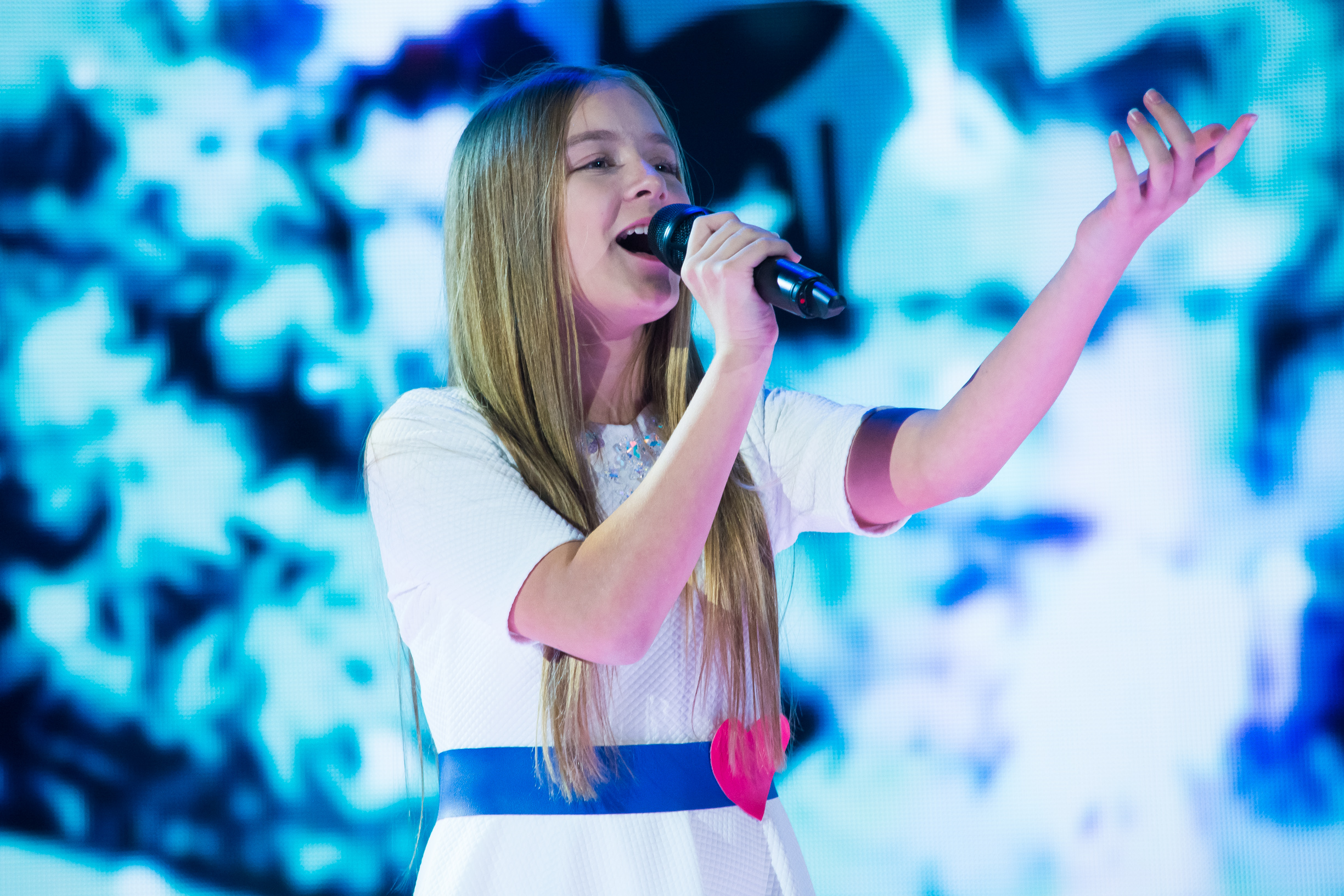 Лина Кудузович на сцене Детского Евровидения 2015 («Армеец», София) во время генеральной репетиции